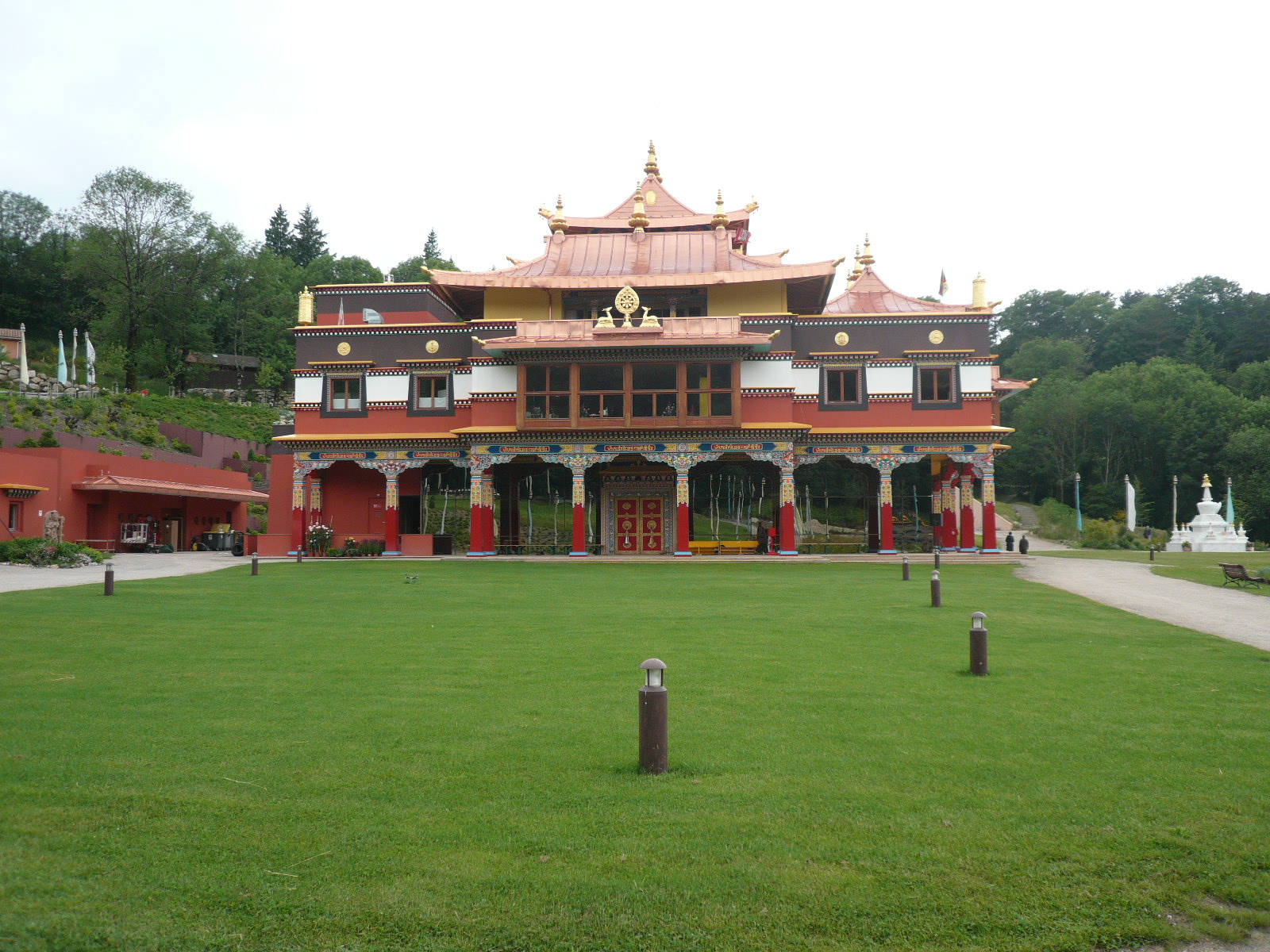 Temple bouddhiste Lerab Ling d'en face